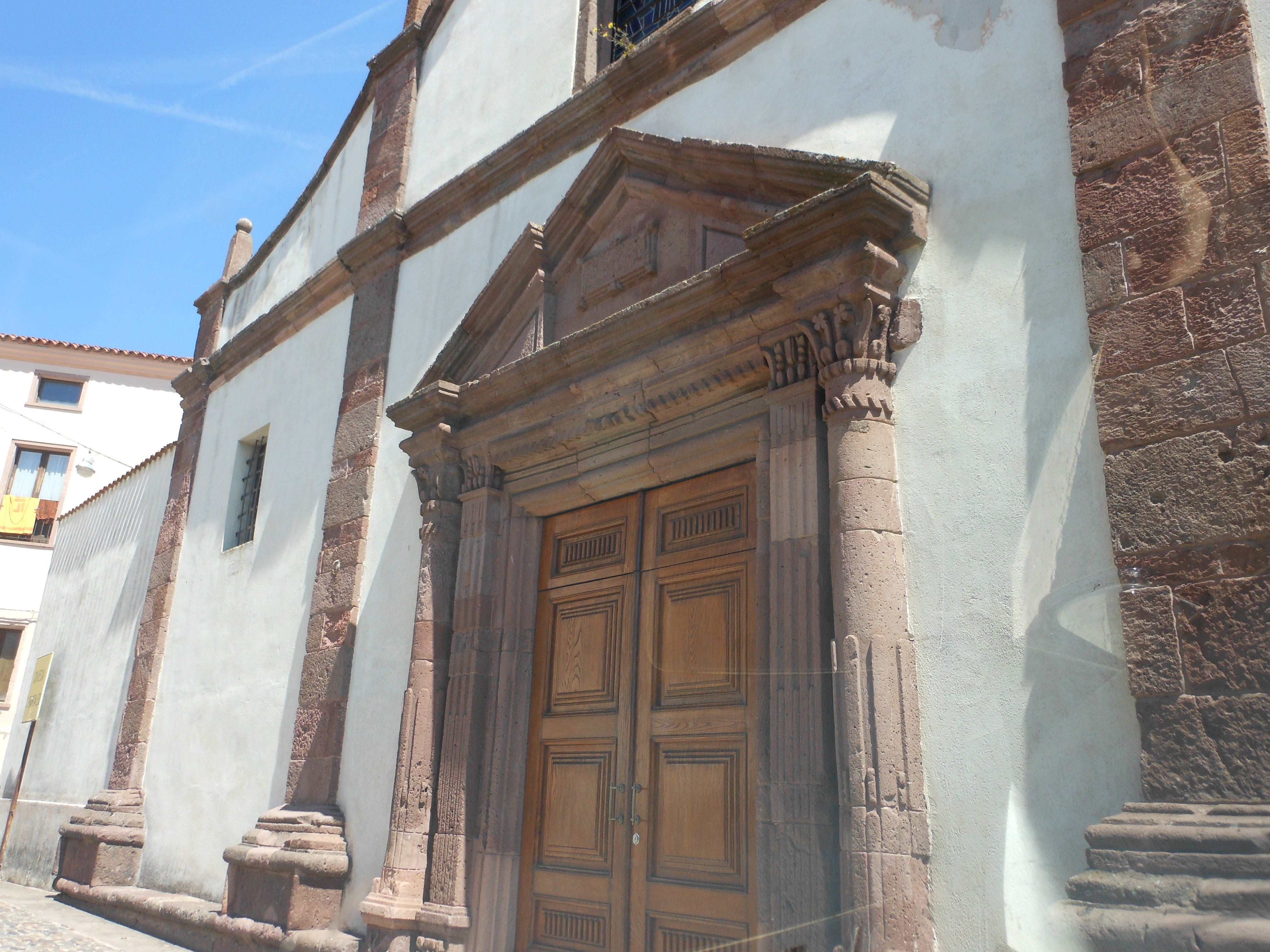 Macomer - Chiesa di San Pantaleo, Sardegna